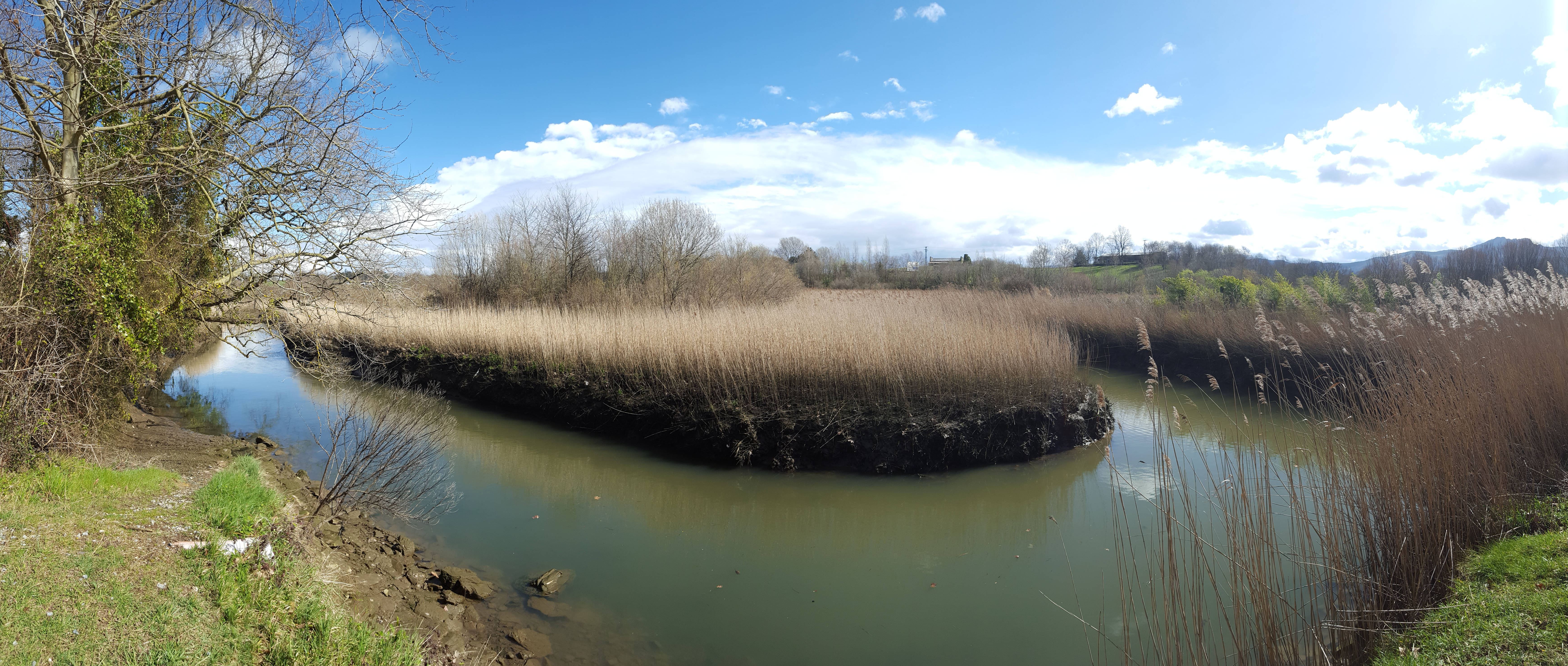 Jaitzubia padura Hondarribian